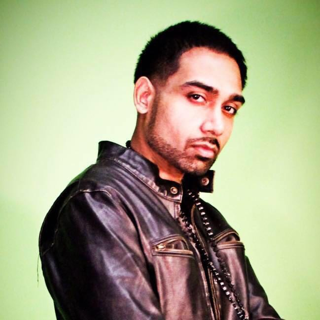 Lazarus in November 2015.